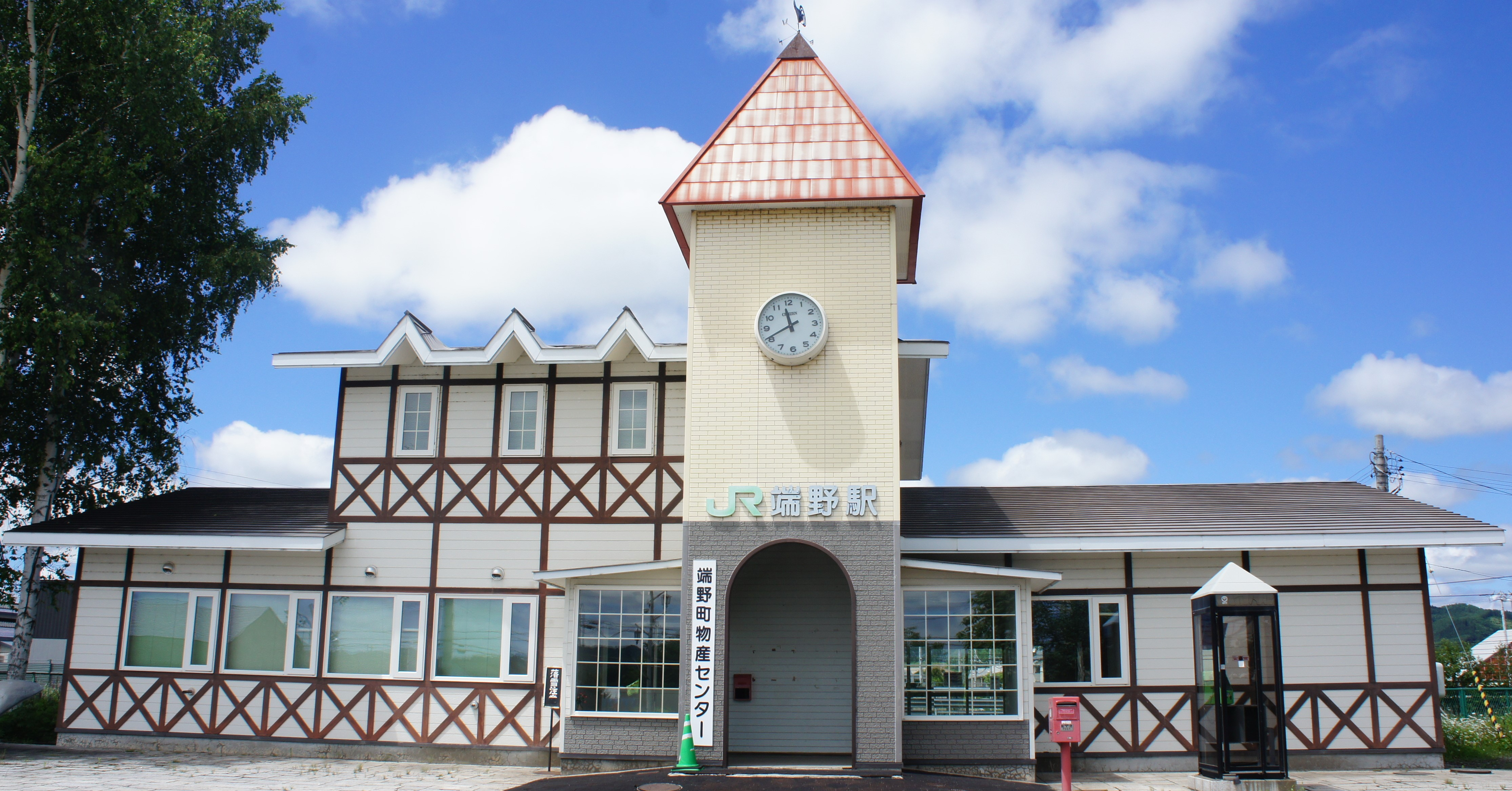 JR石北本線・端野駅の駅舎